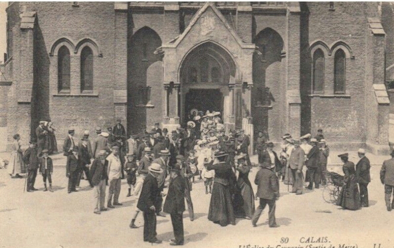 Sortie de messe à l'église du Courgain en 1913.